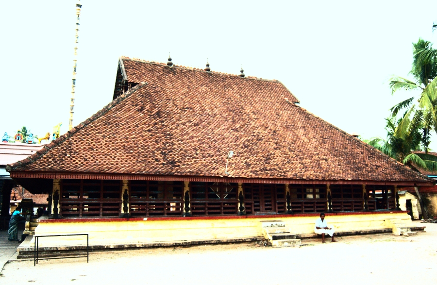 ഹരിപ്പാട് സുബ്രഹ്മണ്യ ക്ഷേതത്തിലെ കൂത്തമ്പലം